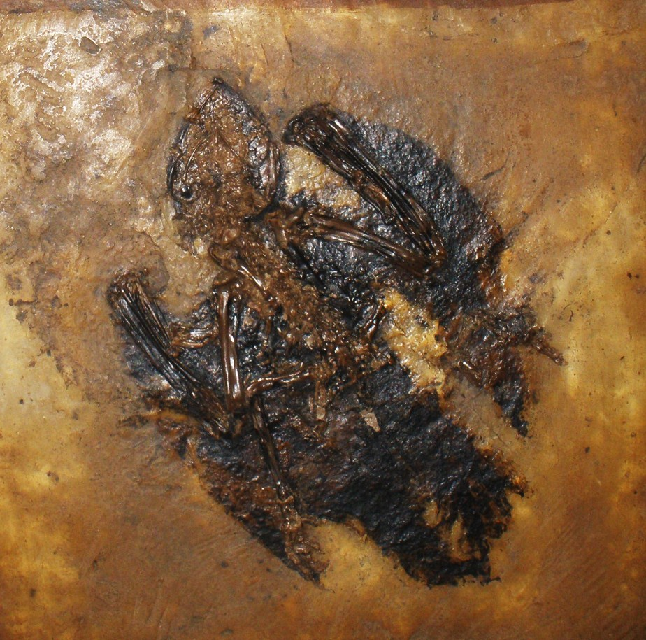 Fossil of Paraprefica, an extinct bird- Took the photo at Senckenberg Museum of Frankfurt